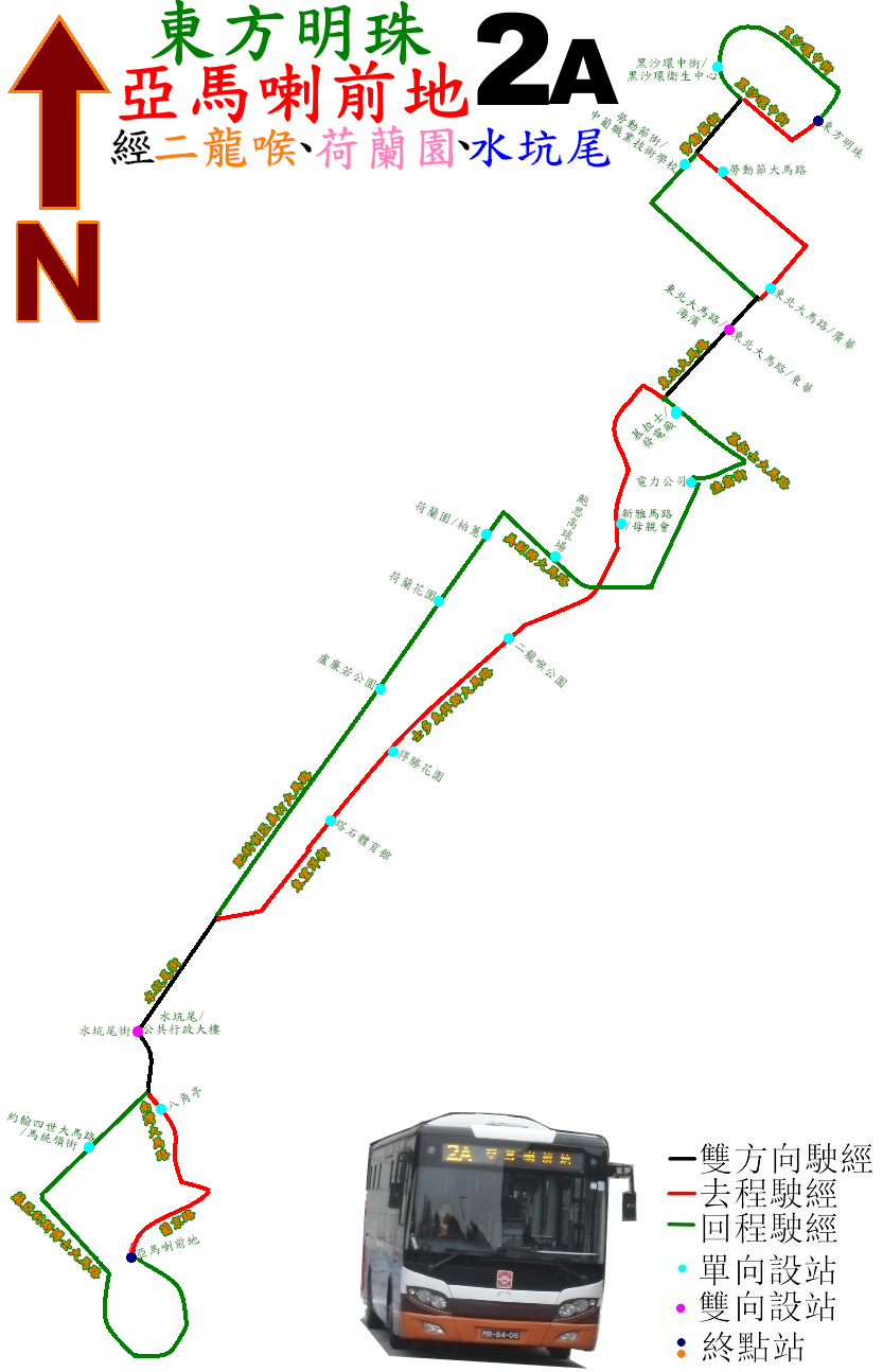 中文（香港）: 澳門巴士2A線的走線圖